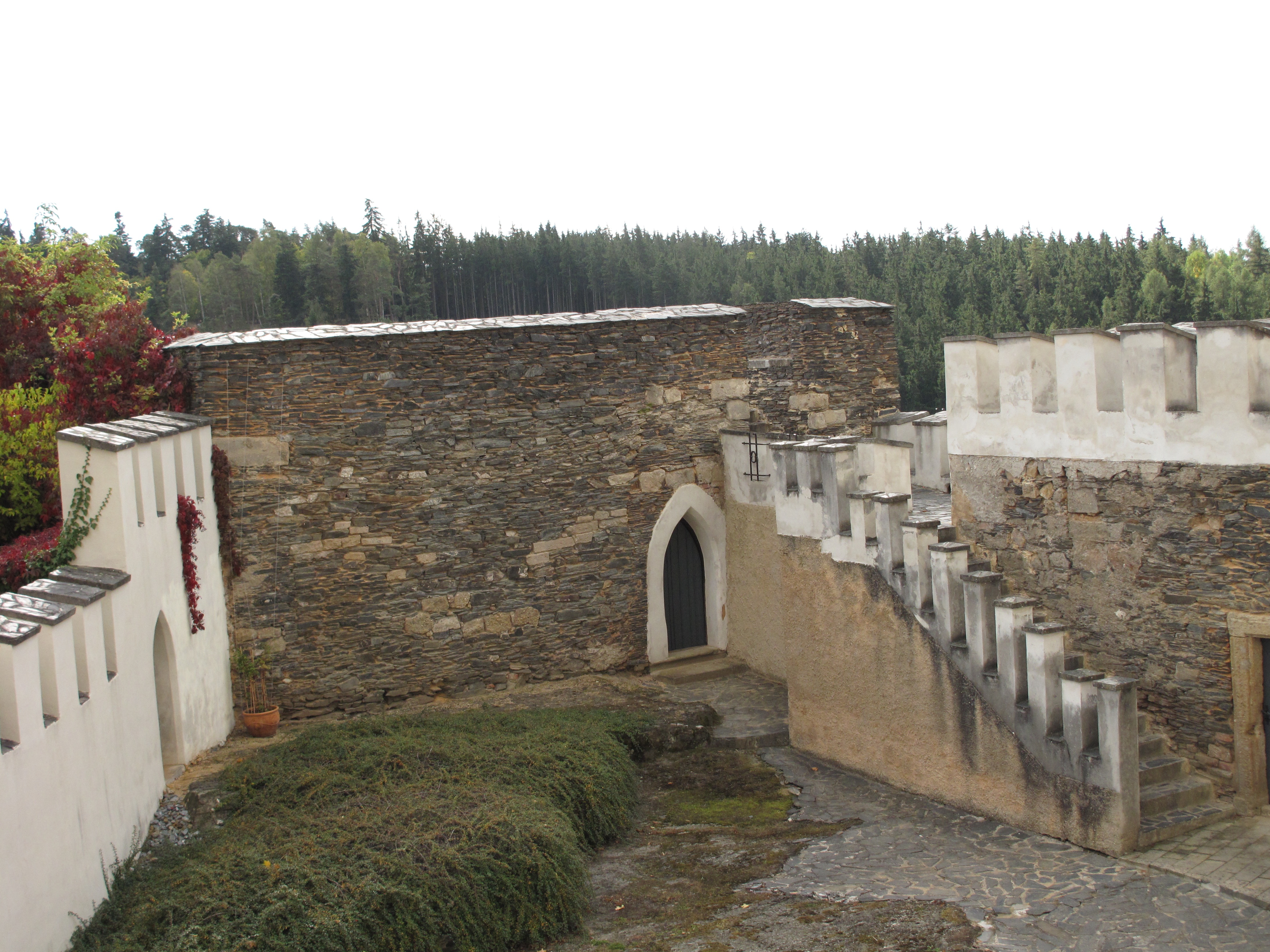 Původní část hradu v rabštejnském zámku. Okres Plzeň-sever, Česká republika.